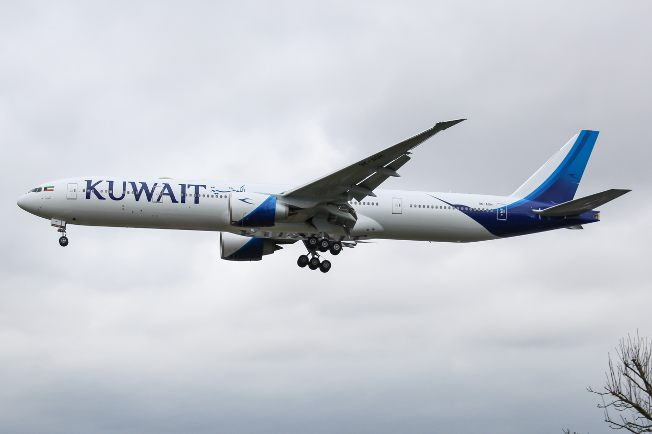 9K-AOH Boeing 777 Kuwait